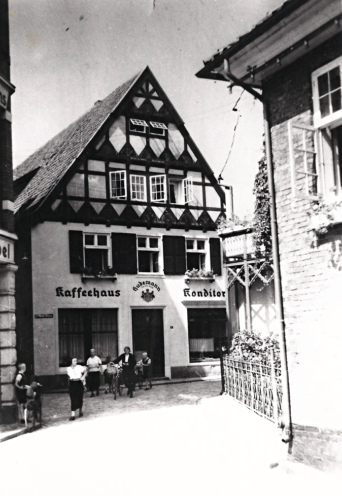 Kaffeehaus Hudemann, undatiert (zwischen 1925 und 1937), rechts ist eine doppelgeschossige Veranda sichtbar, die damals zum Café gehörte